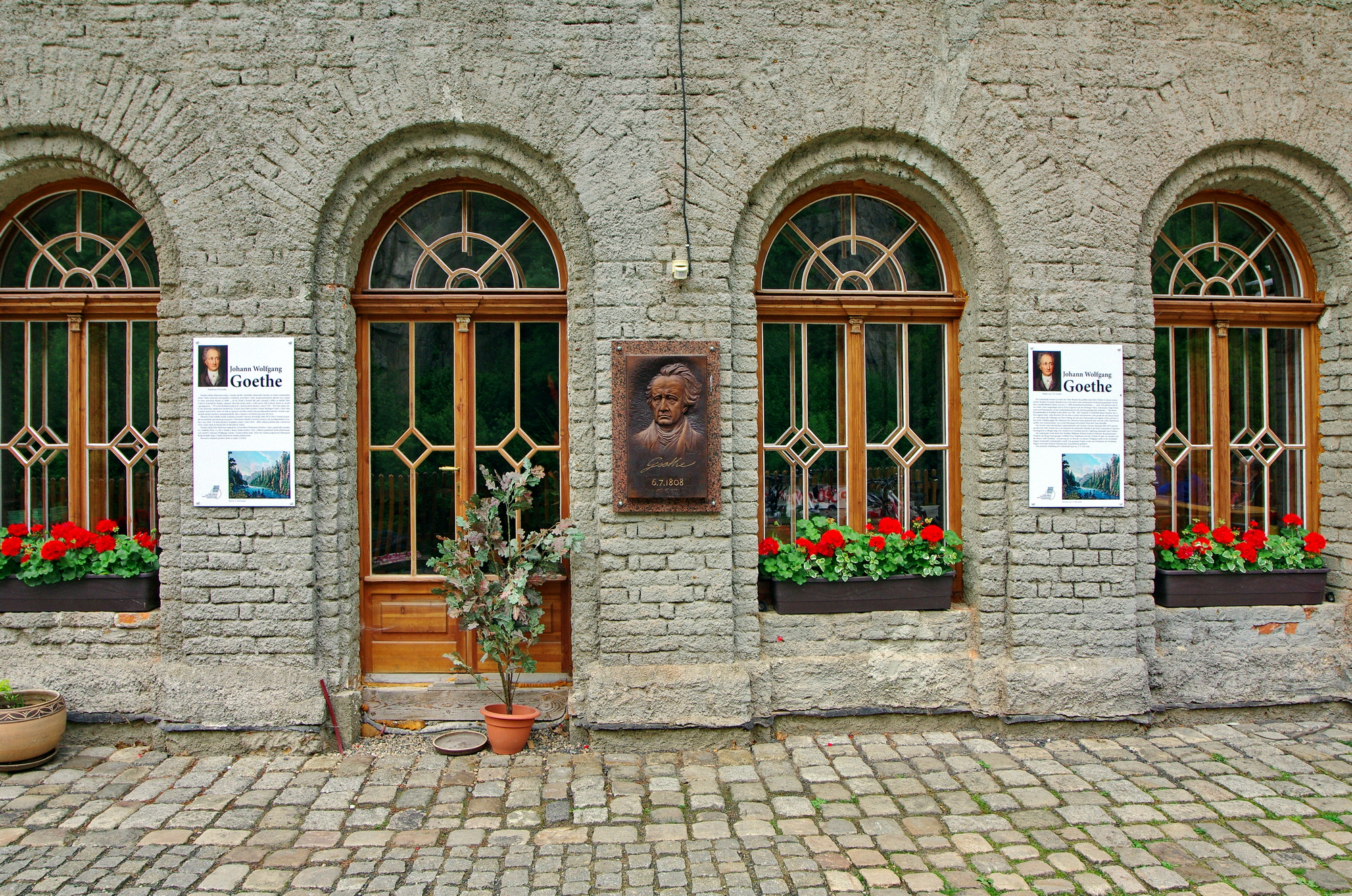 Pamětní deska J.W.Goetheho u Svatošských skal, okres Karlovy Vary